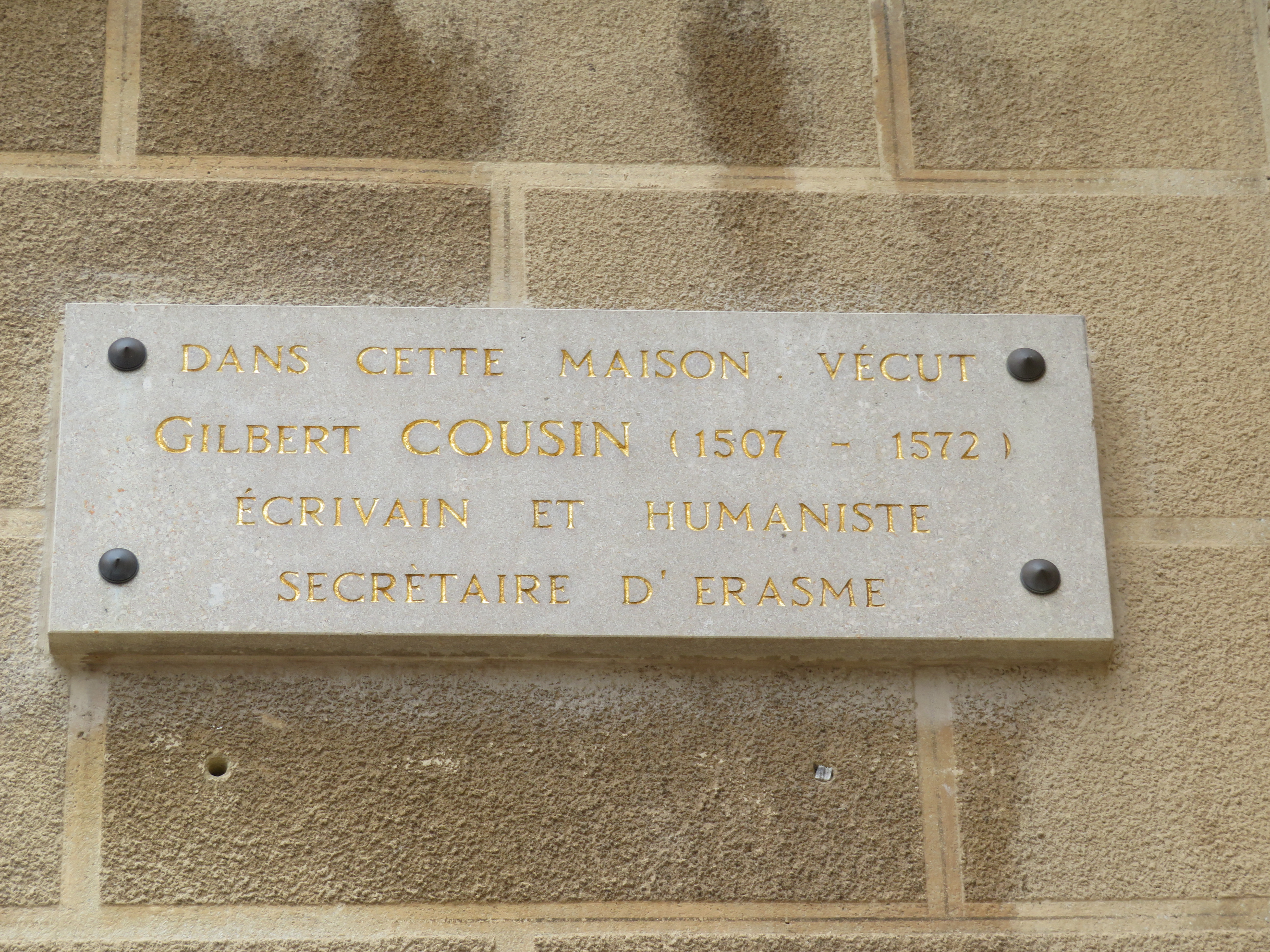 Plaque posée place des Annonciades à Nozeroy. Inscription : Dans cette maison vécut Gilbert Cousin (1507 - 1572) écrivain et humaniste secrétaire d'Érasme